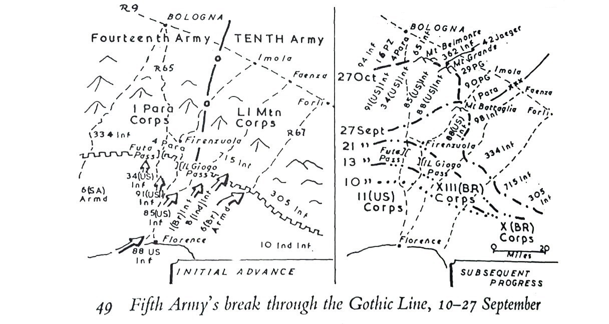 fifth army1